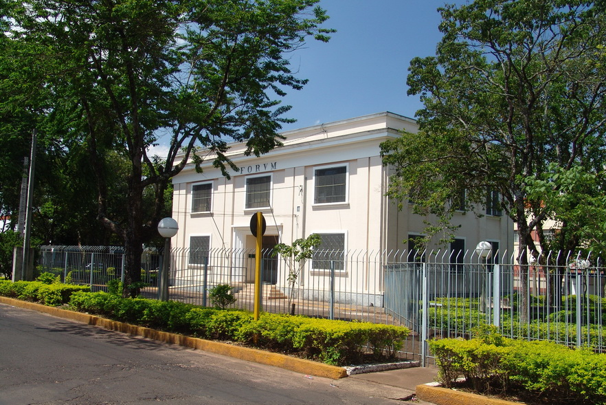 Imagem do município de Dois Córregos, estado de São Paulo, Brasil.